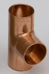 T-Lötfitting aus Kupfer, Typ 5130.